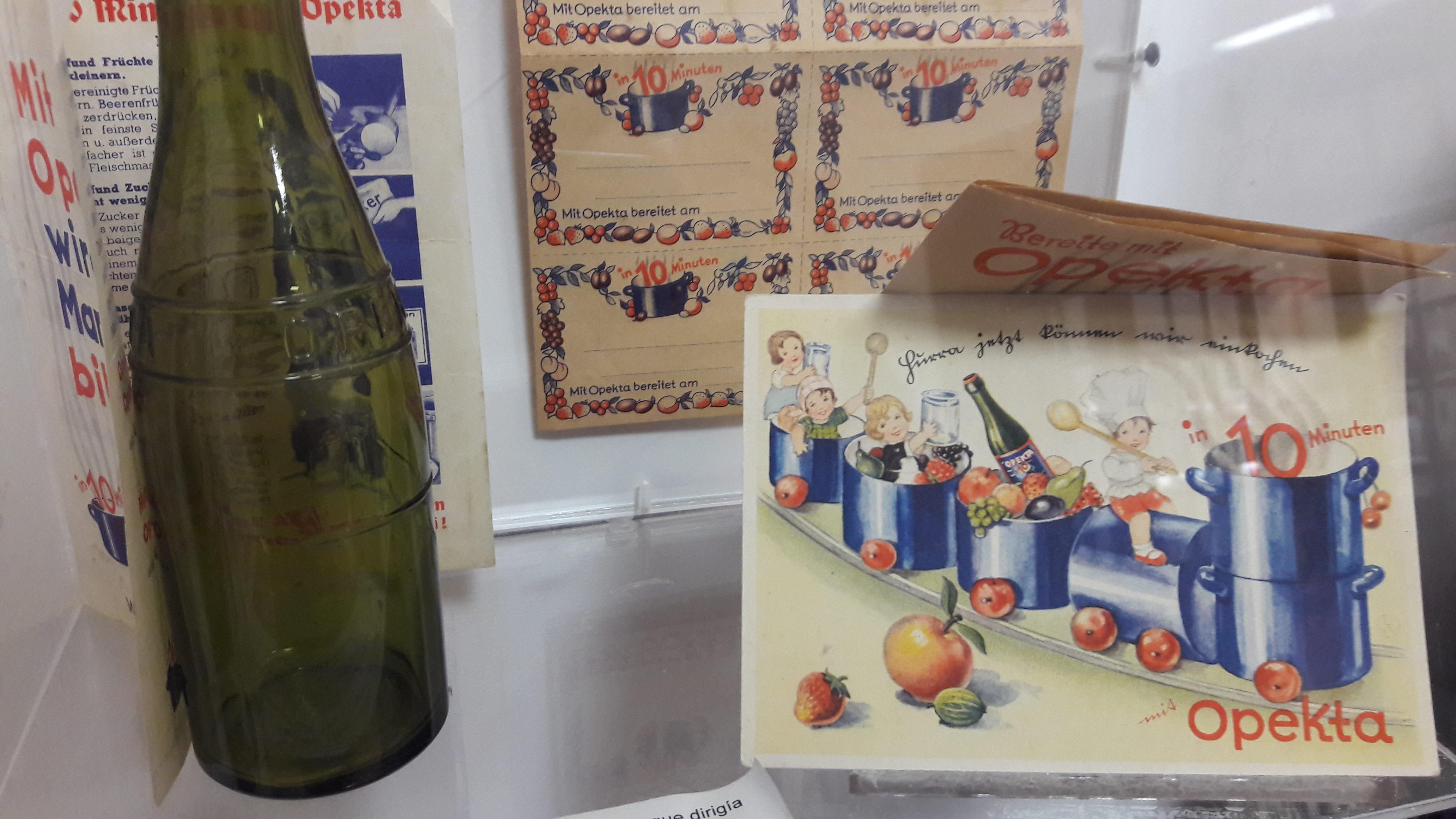 Del Centro Ana Frank Argentina